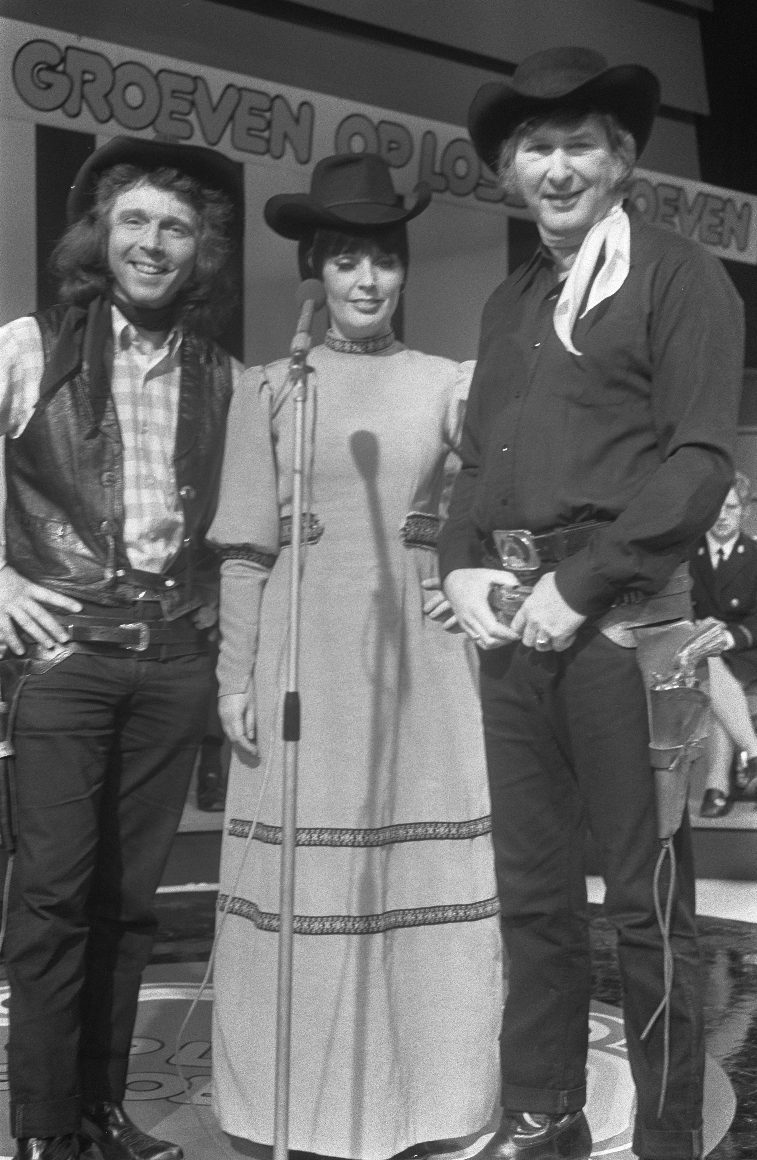 Collectie / Archief : Fotocollectie Anefo Reportage / Serie : Opnames voor het TROS tv-programma "Op Losse Groeven" Beschrijving : De Chico's Datum : 23 januari 1974 Locatie : Hilversum, Noord-Holland Trefwoorden : popgroepen, televisieprogramma's Persoonsnaam : Chicos Instellingsnaam : TROS Fotograaf : Fotograaf Onbekend / Anefo Auteursrechthebbende : Nationaal Archief Materiaalsoort : Negatief (zwart/wit) Nummer archiefinventaris : bekijk toegang 2.24.01.05 Bestanddeelnummer : 926-9602 Reacties Geplaatst door Maaike op 28 augustus 2012 - 18:29. Persoonsnamen: Simon Sint, Conny Schouwman en Frans Doolaard Geplaatst door Musicfan op 29 juni 2016 - 21:22. Connie of Conny Brand